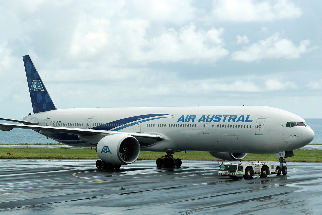 F-ONOU auf dem Heimatflughafen Roland Garros